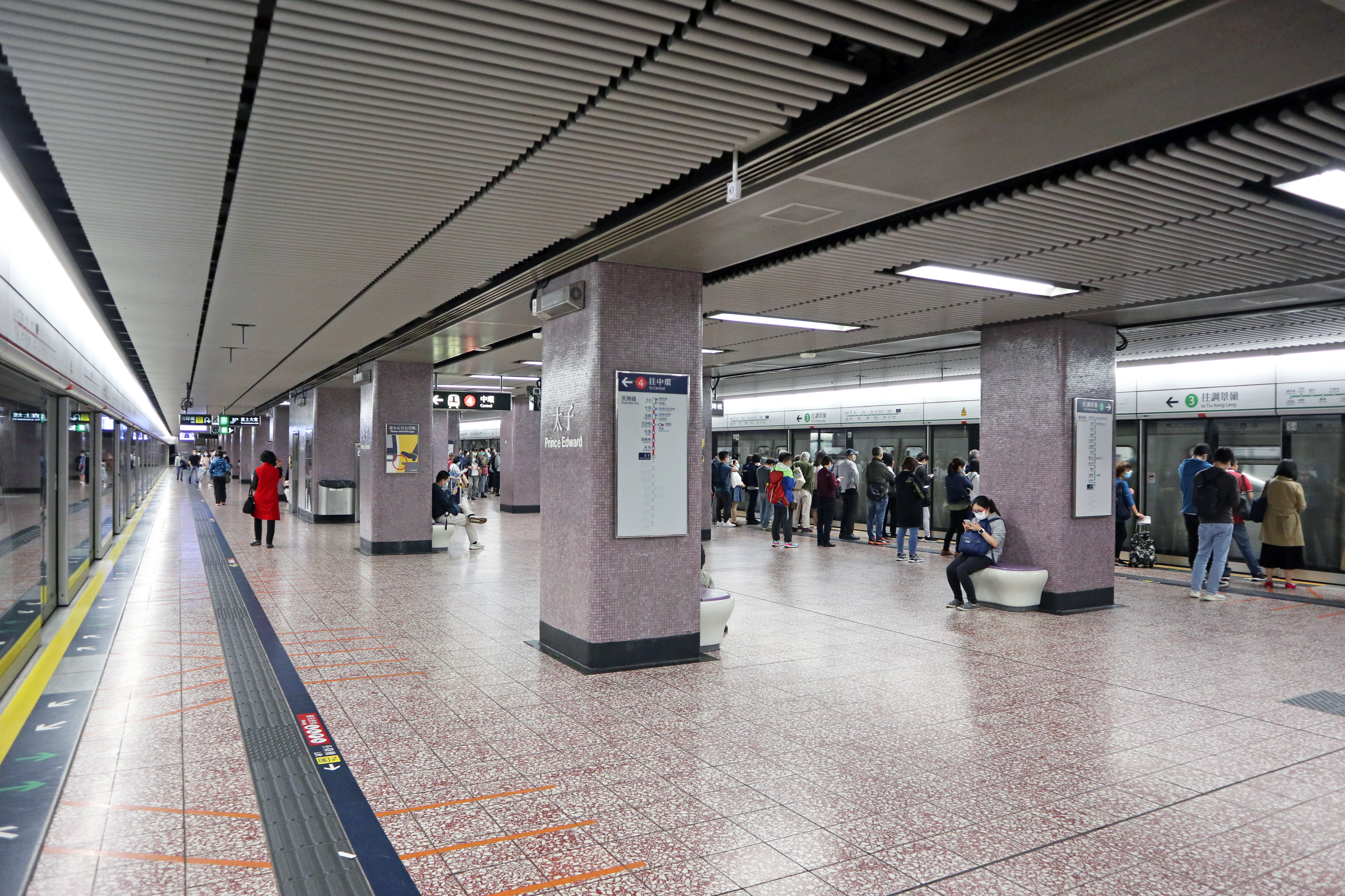 港鐵太子站月台